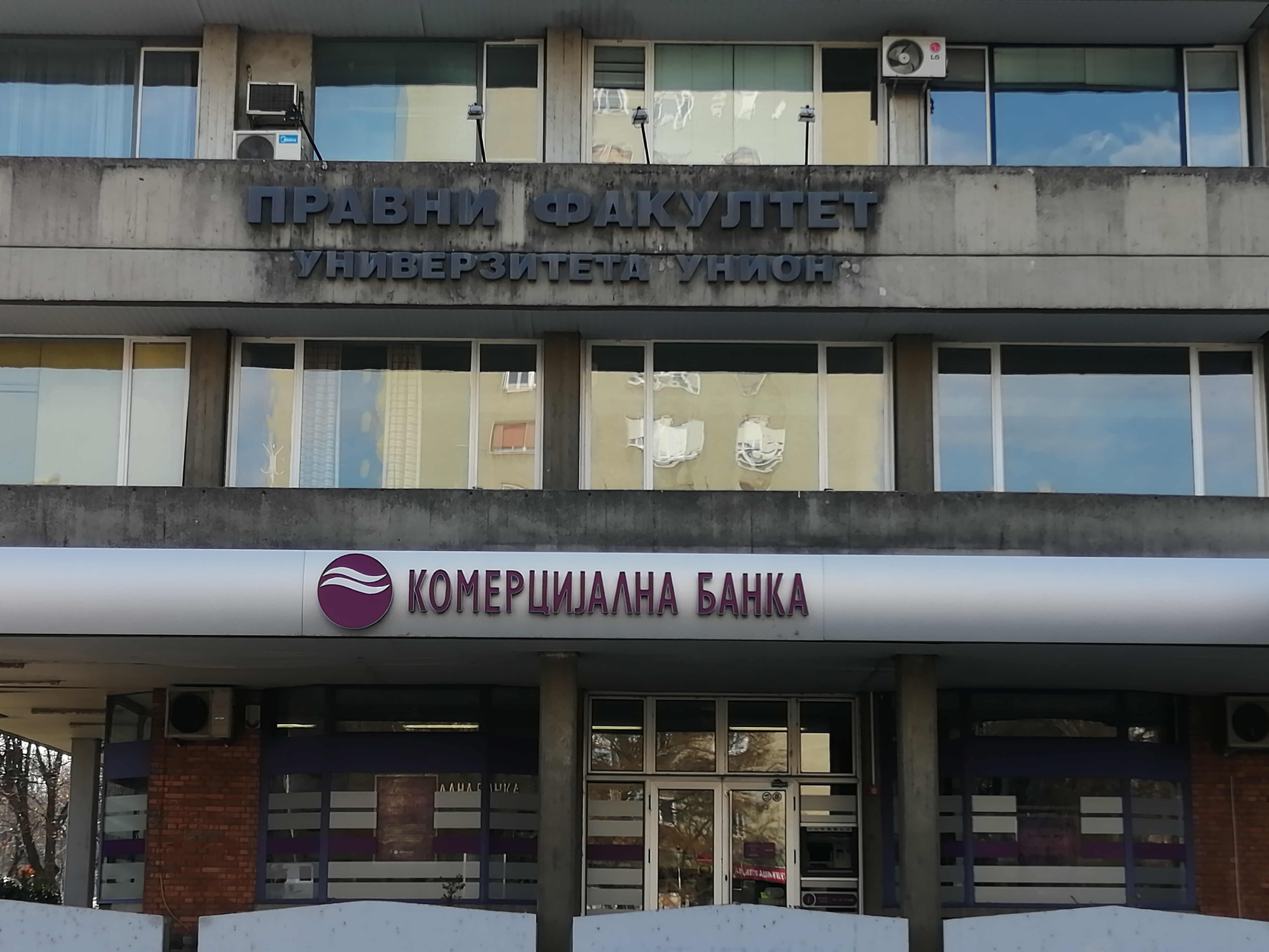 Srpski (latinica): Pravni fakultet Univerziteta Union